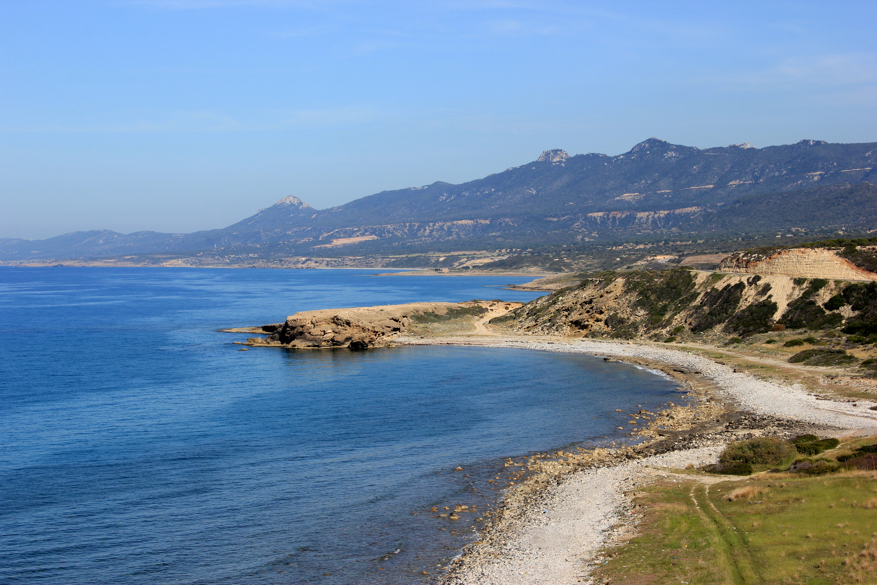 An der Nordküste der Karpas-Halbinsel, Zypern.